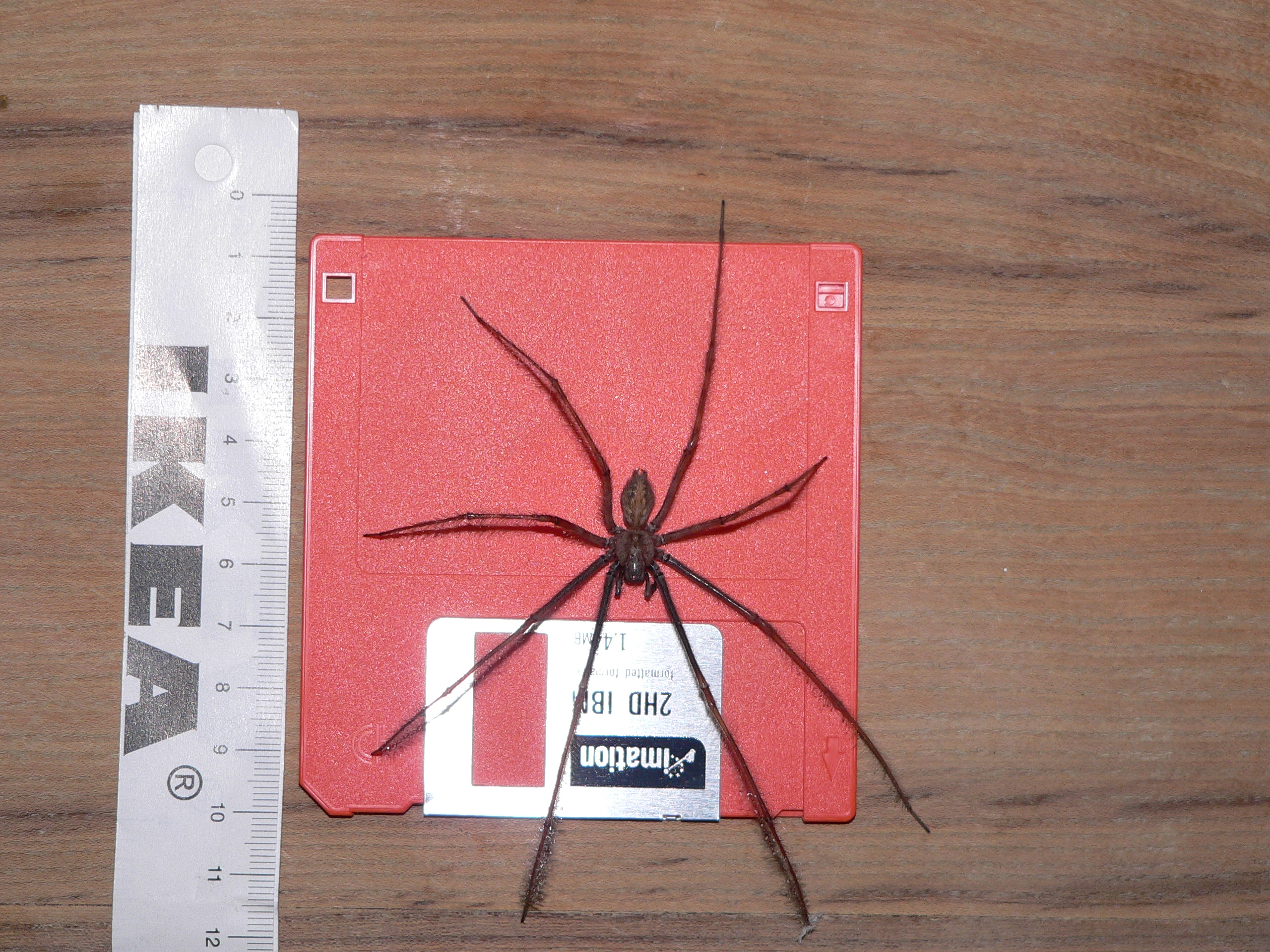 Tegenaria parietina mâle / Enghien - Belgique / septembre 2007.